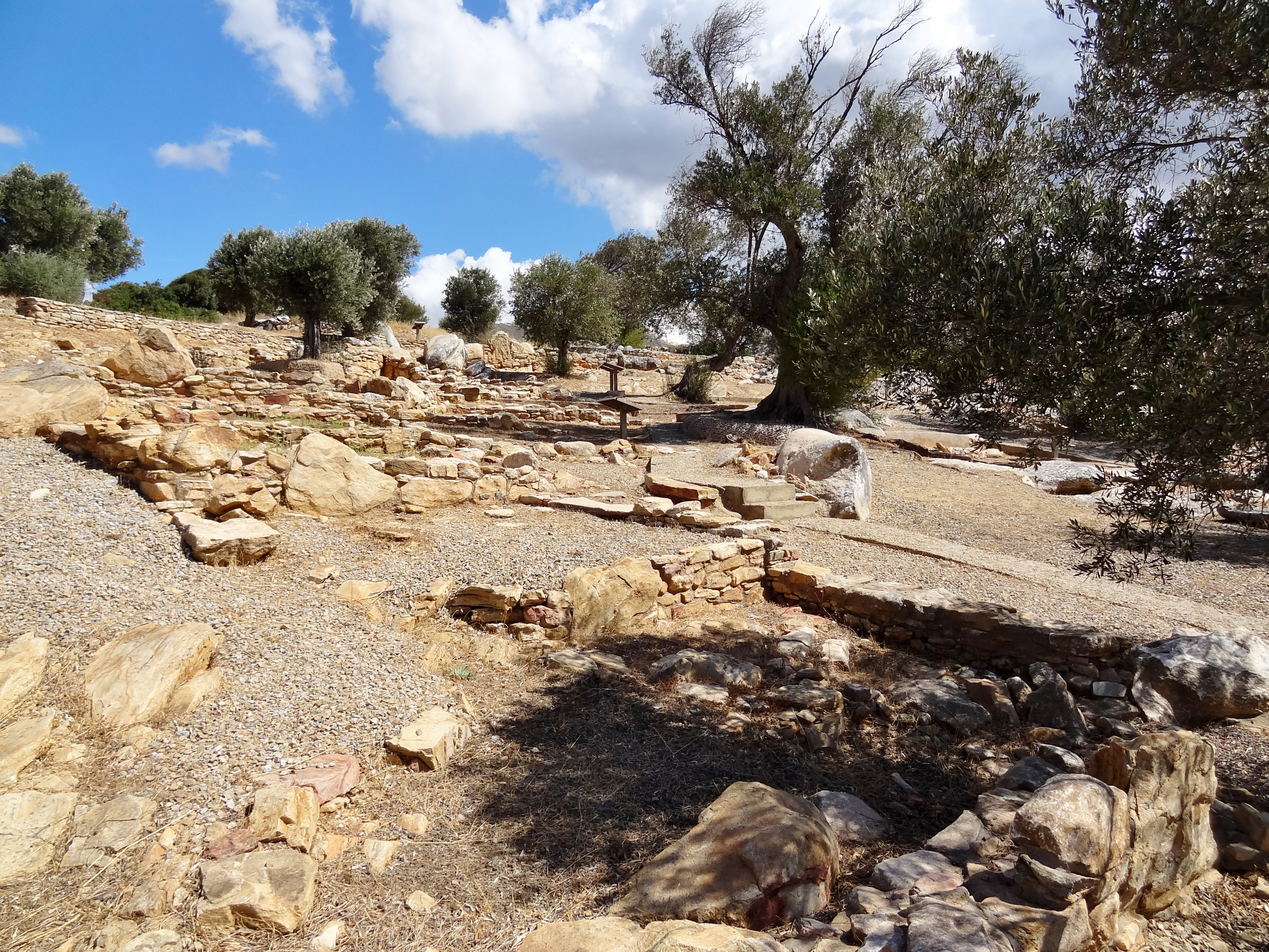 Heiligtum von Flerio auf Naxos, Kykladen, Griechenland